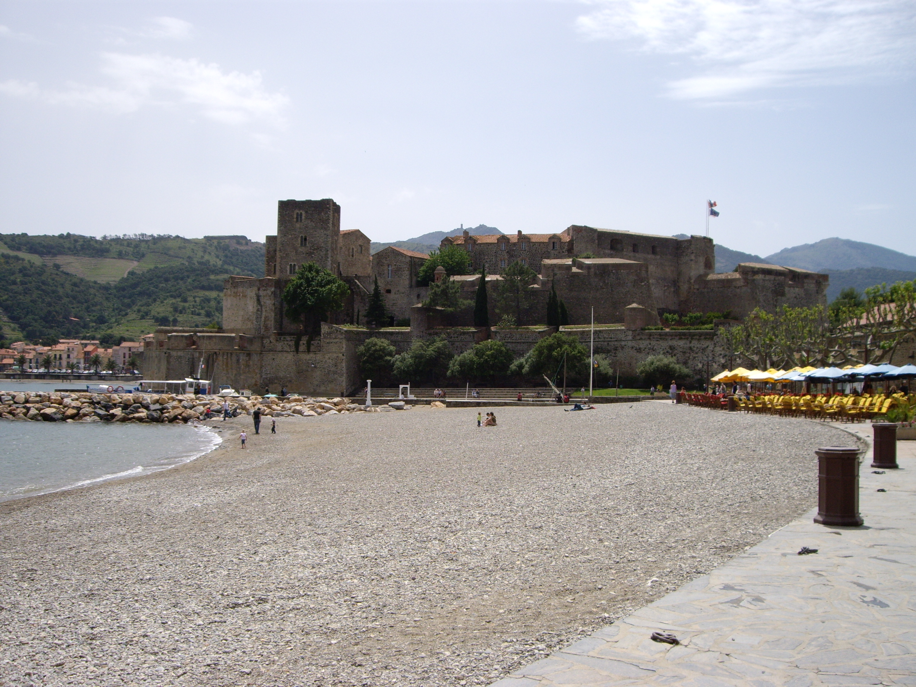 Château royal de Collioure (66)